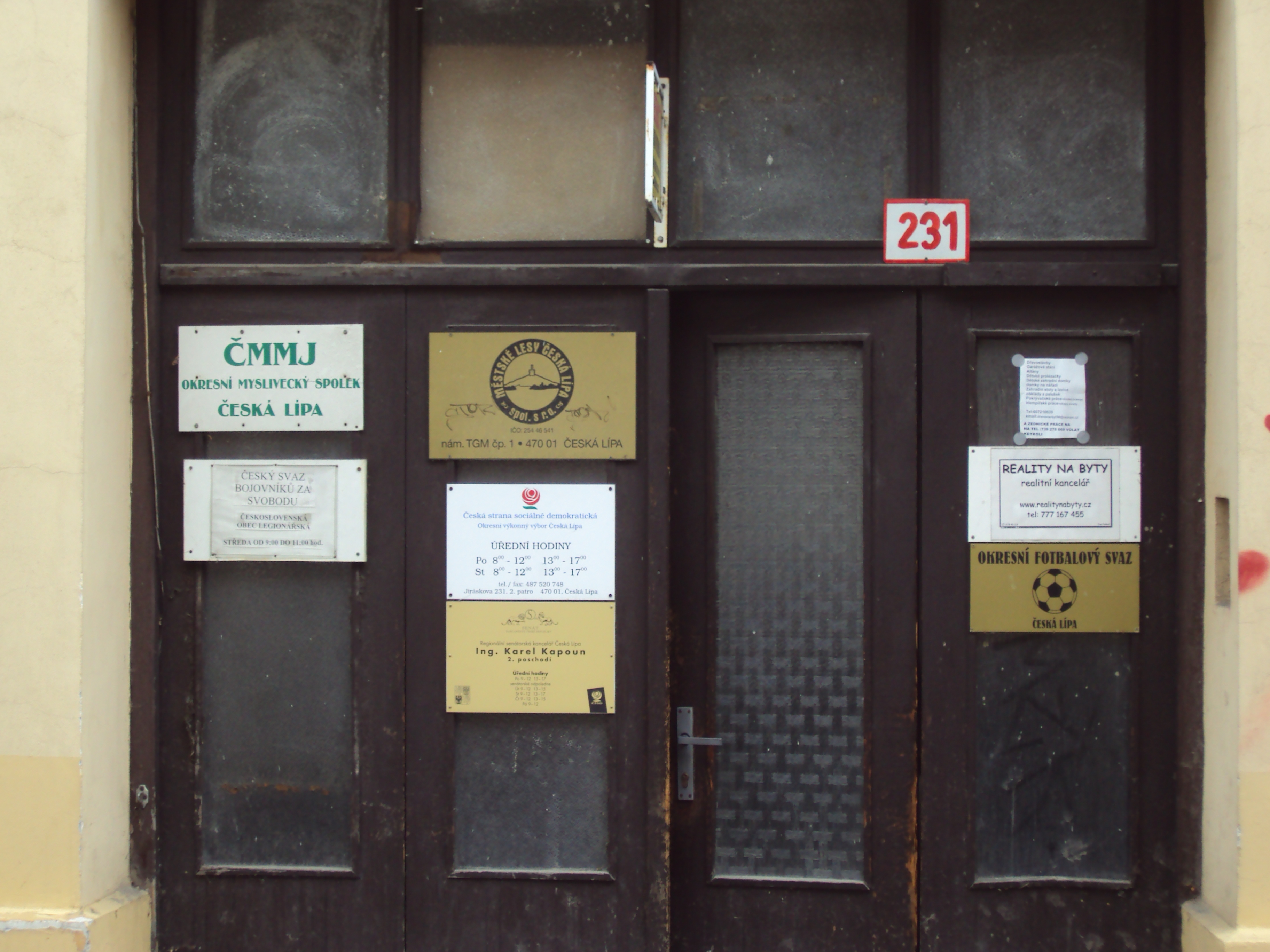 Starší cedule na domě Žižkova 231 nad náměstím, domov mnoha českolipských spolků, senátorská kancelář Kapouna, OV fotbalistů OV ČSTV atd